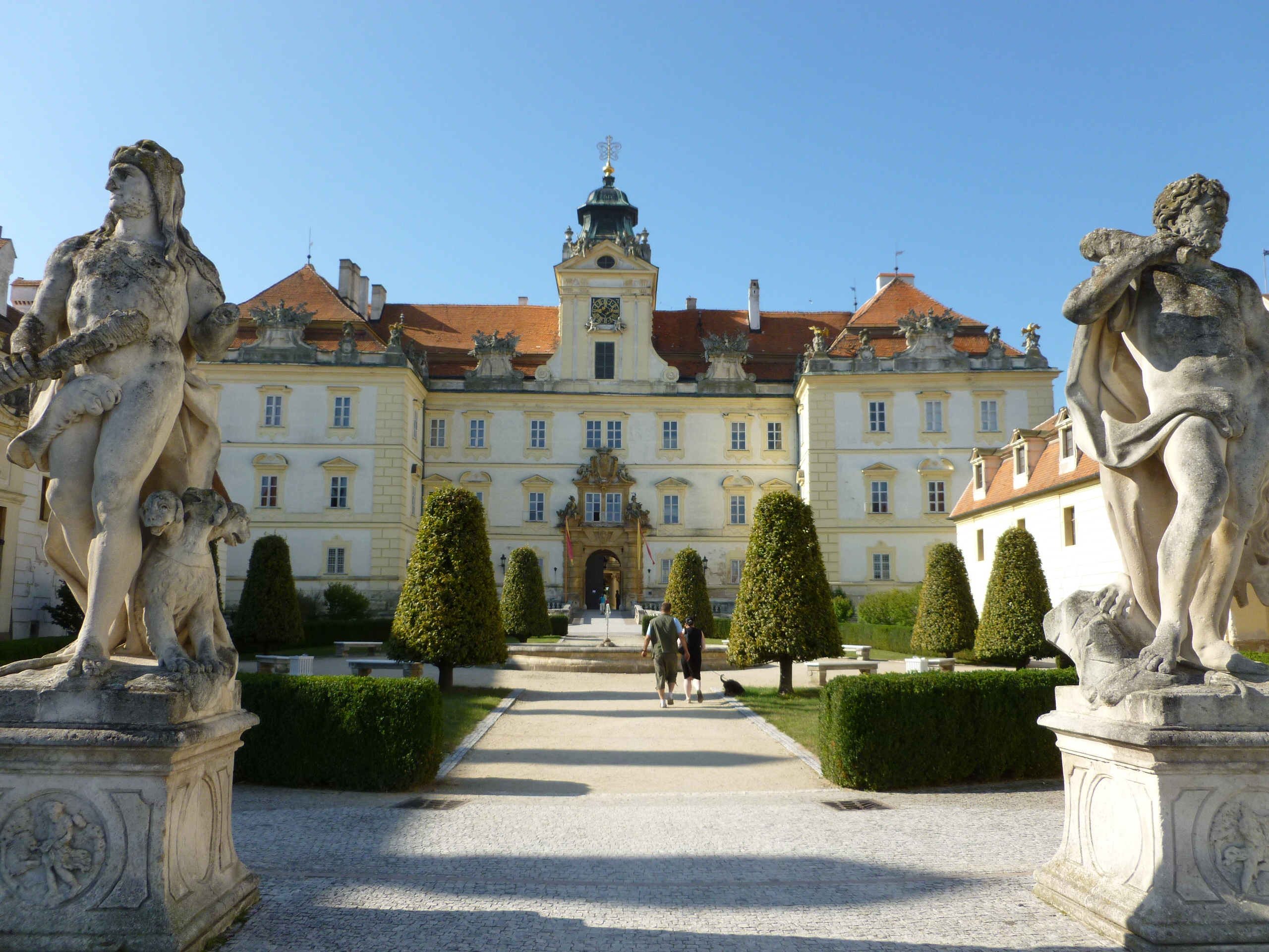 Zámek Valtice, Valtice 1